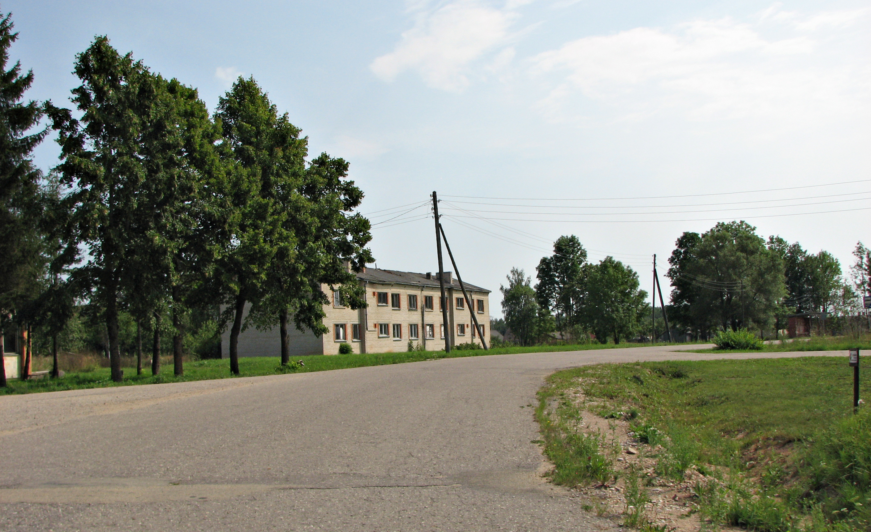 въезд в Неикшани